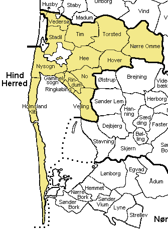 Hind Herred, Ringkøbing Amt, Denmark Map by Svend-Erik Christiansen , edited by Nico-dk.